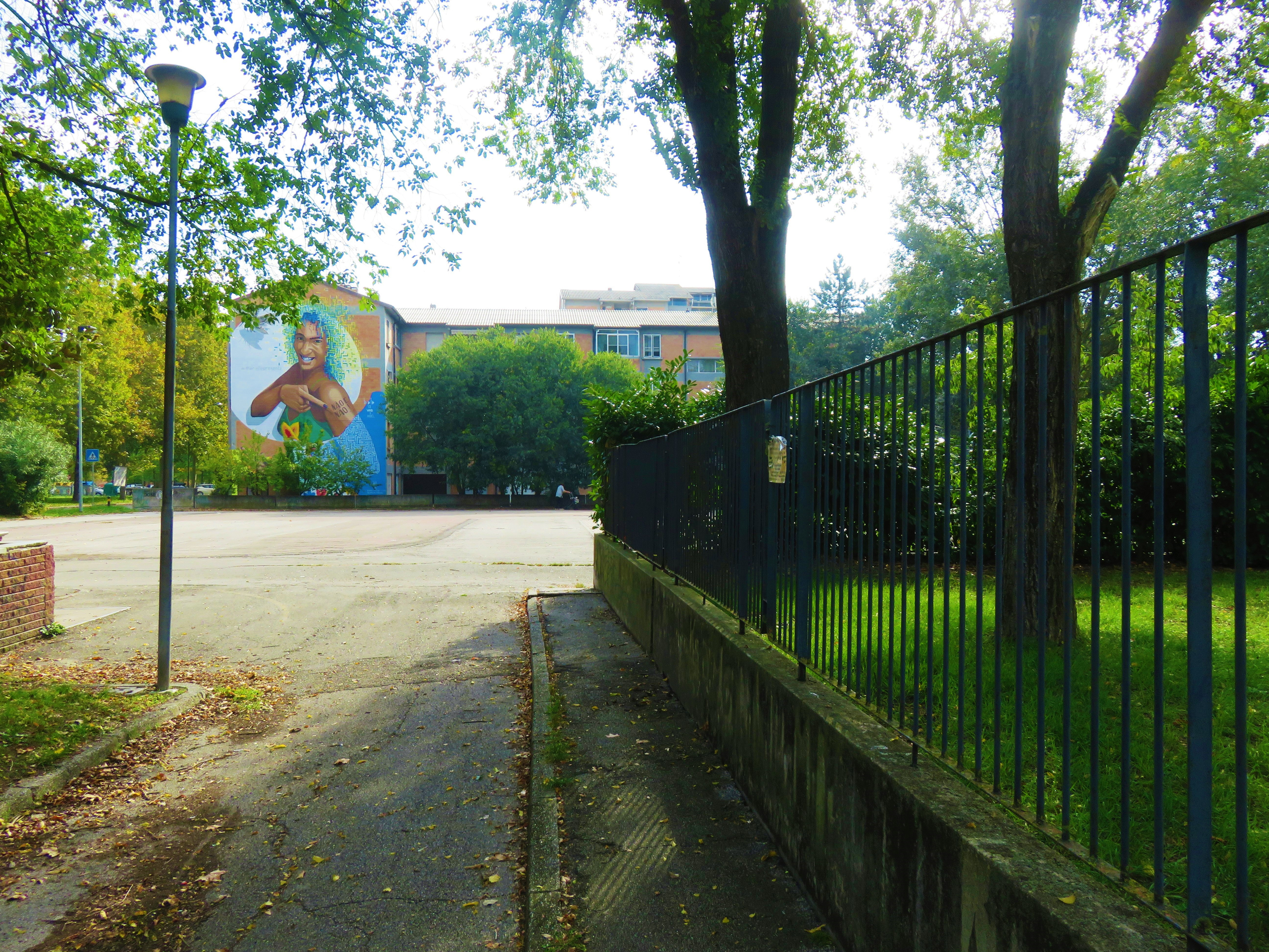 Murale realizzato in viale Krasnodar a Ferrara nel 2018